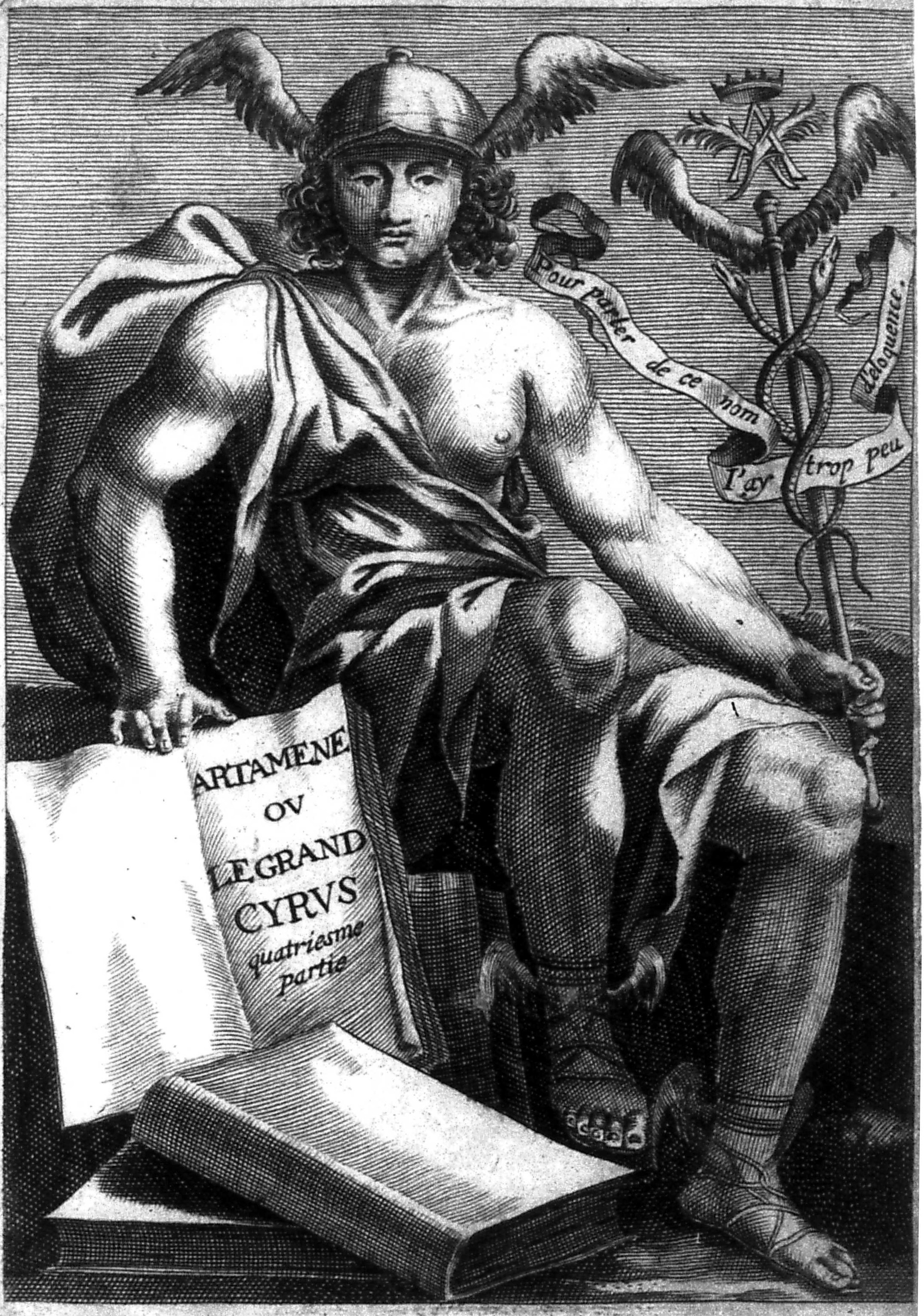 dessin de Regnesson.